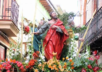 paso de los apóstoles